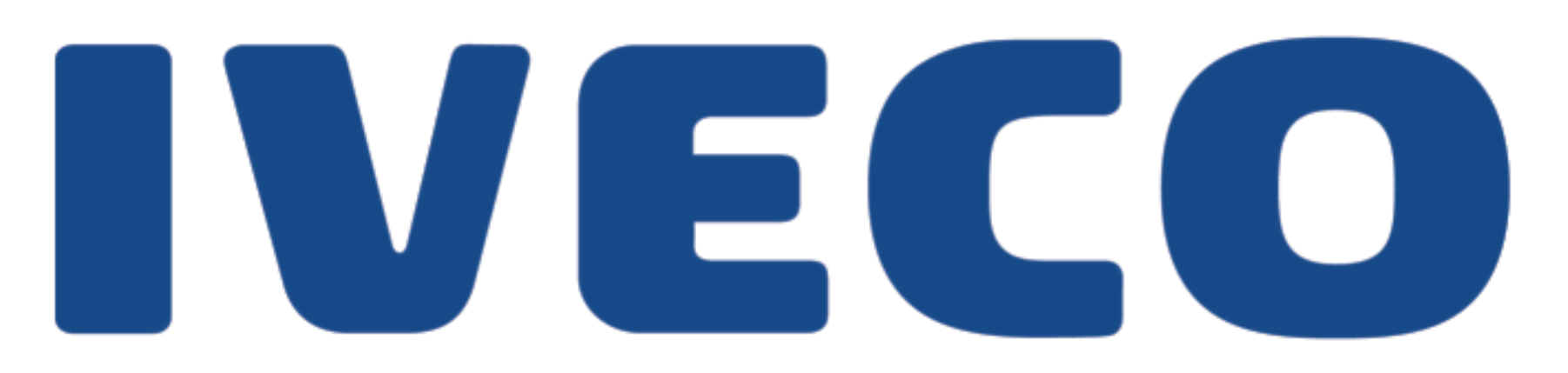 Iveco logo